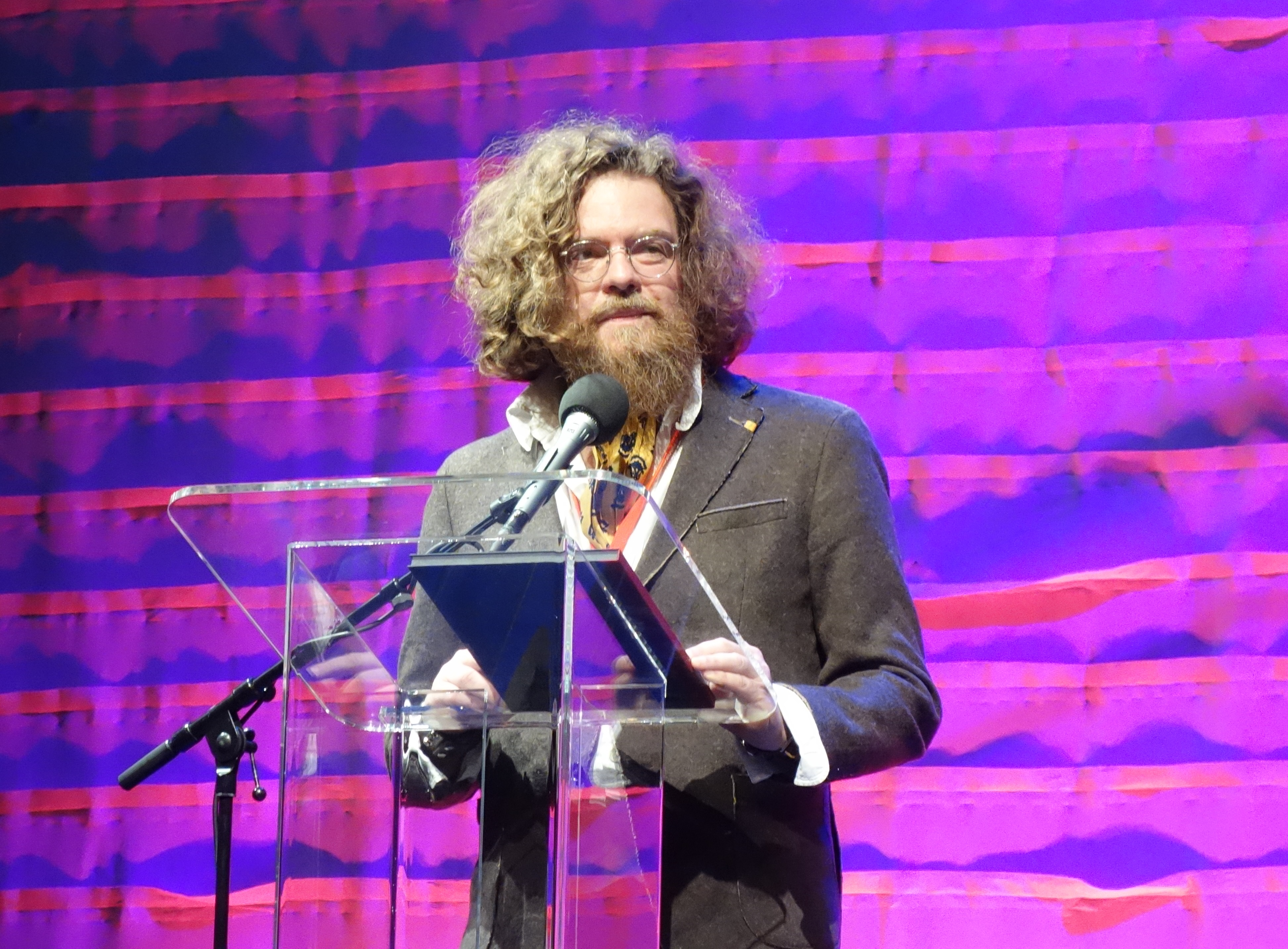 Belgisch auteur Jeroen Olyslagers tijdens Winternachten 2018 (Writers Unlimited), Den Haag. Toekenning F. Bordewijkprijs